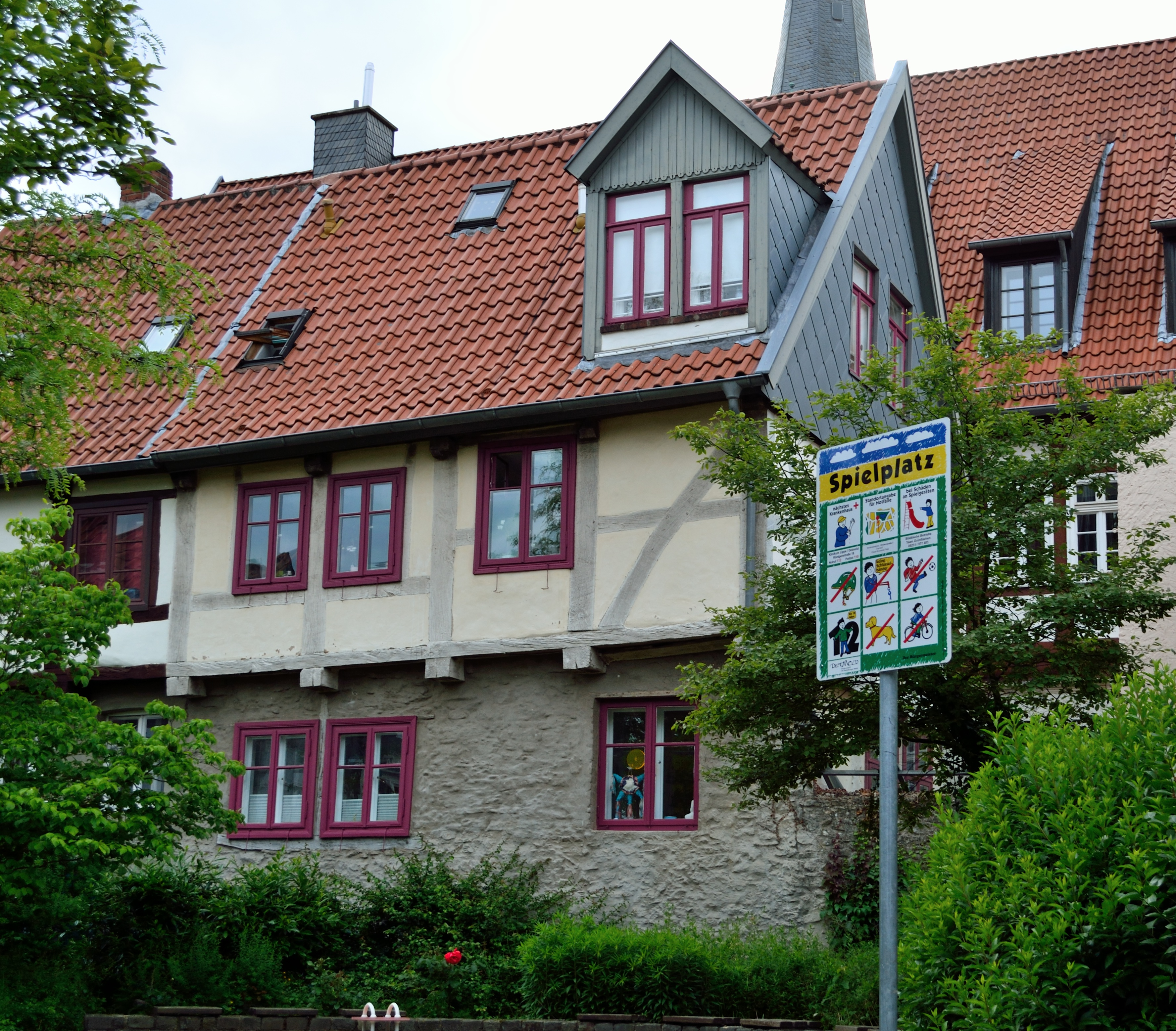 Fachwerktraufenhaus auf der Stadtmauer This is a photograph of an architectural monument.